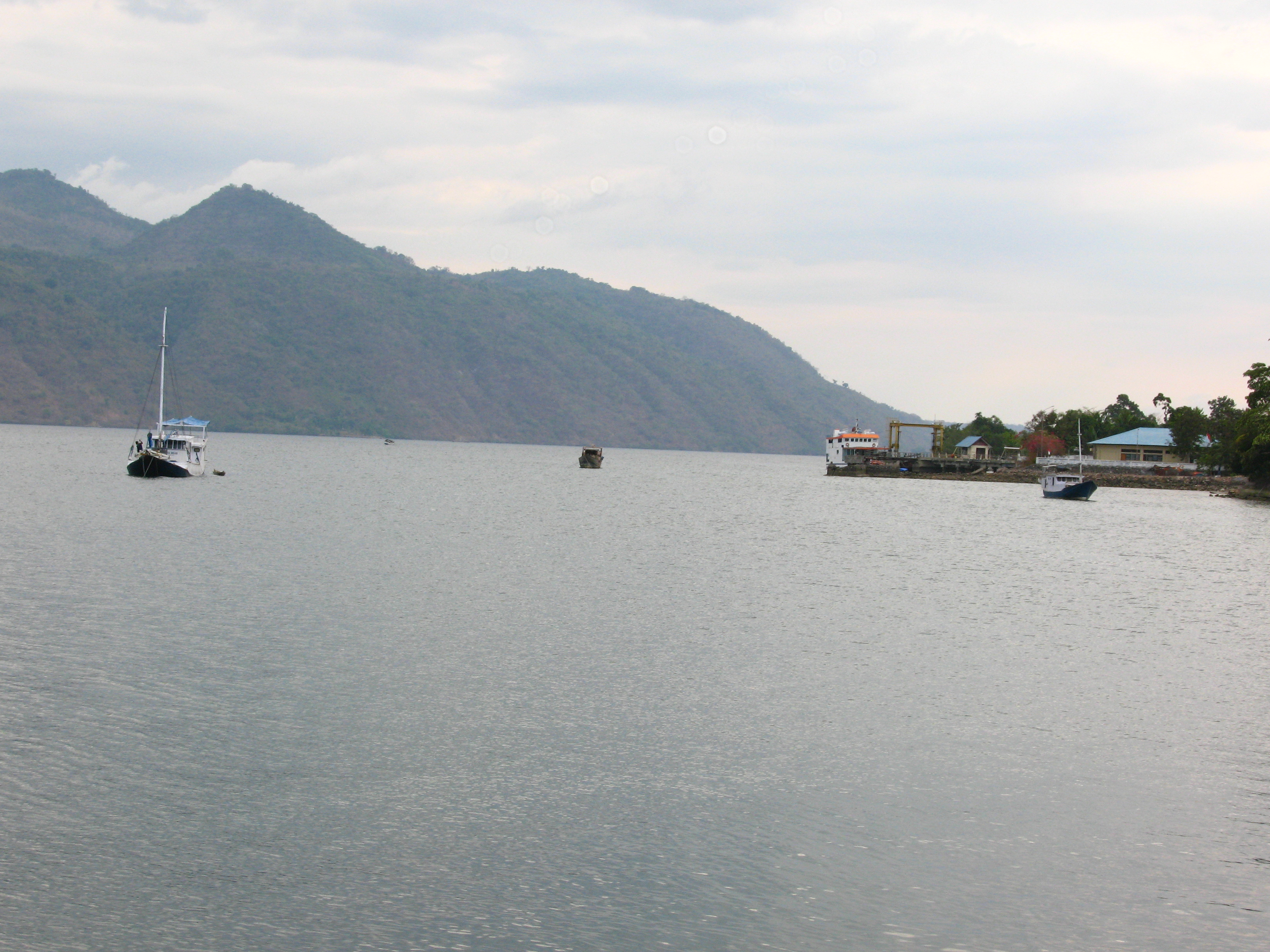 Port Kalabahi, Alor, NTT